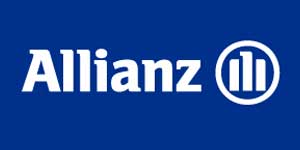 Beschreibung: Logo der Allianz Gruppe in Österreich Autor: Allianz Elementar Versicherungs-AG Erstellungsdatum: 28.1.2010